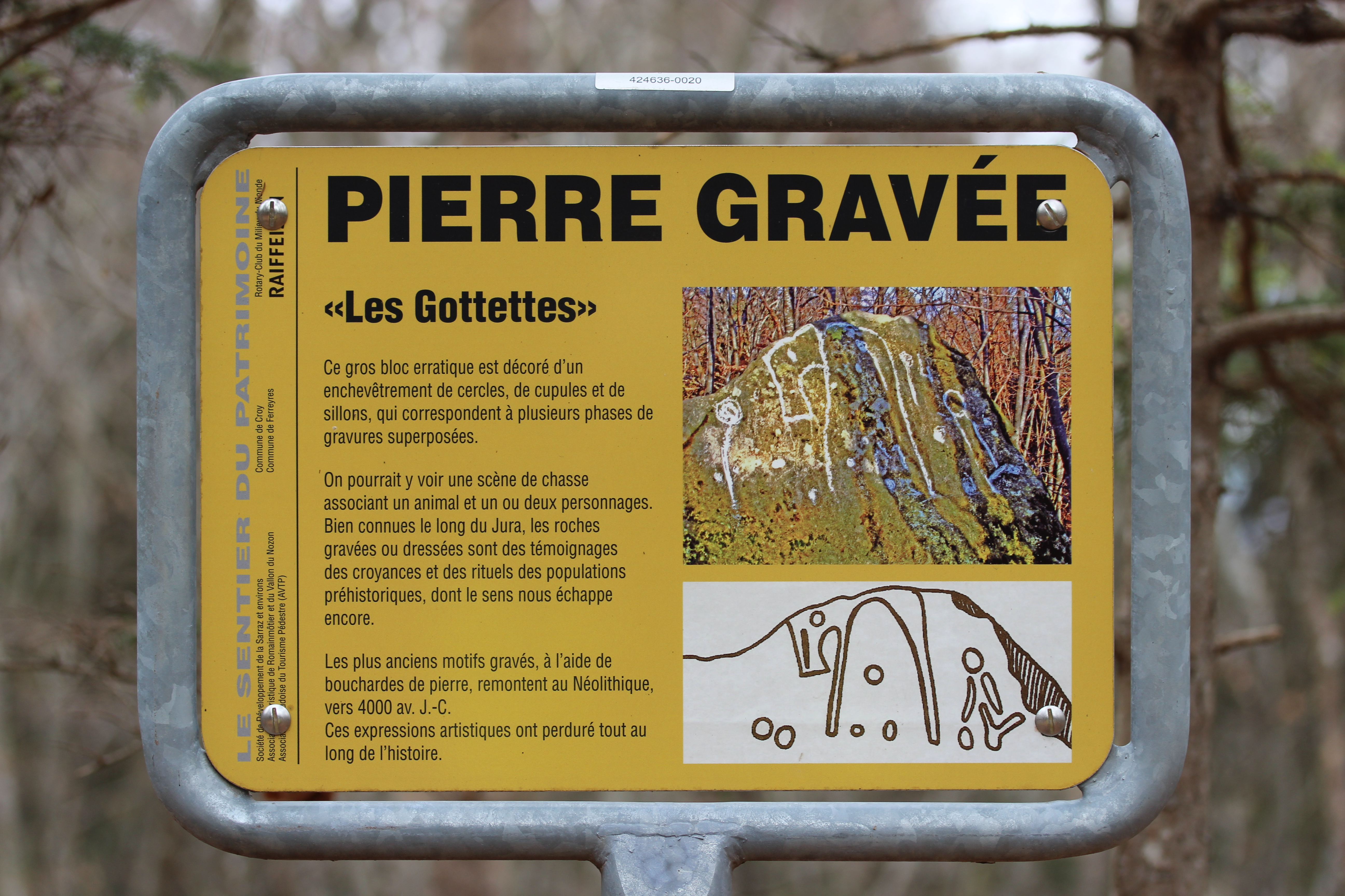 Pierre gravée